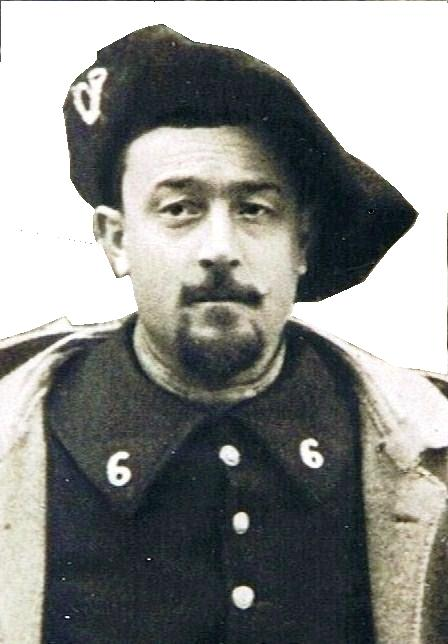 César Ernest Payan (1879-1918), Maire d'Entraunes (Alpes-Maritimes) de 1907 à 1918. Agé de 35 ans, li est mobilisé en décembre 1914 au 6e BCA territorial de Nice puis passe le 11 avril 1918 au 65e BCP de la 56e Division d'infanterie. Tué à l'ennemi le 20 août 1918 à Villers-lès-Roye (Somme) au début de la grande offensive des Alliés qui se termine par la capitulation de l'Allemagne. Mort pour la France.